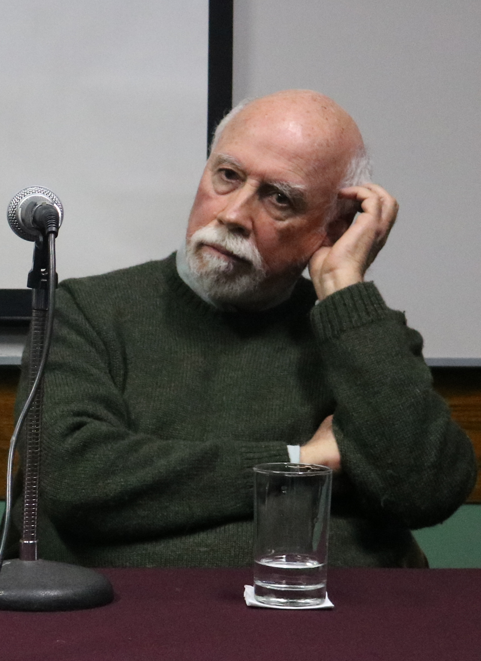 Isaac León Frías durante la conferencia en Reconocimiento a Carlos Galiano en el 22 Festival de Cine de Lima.